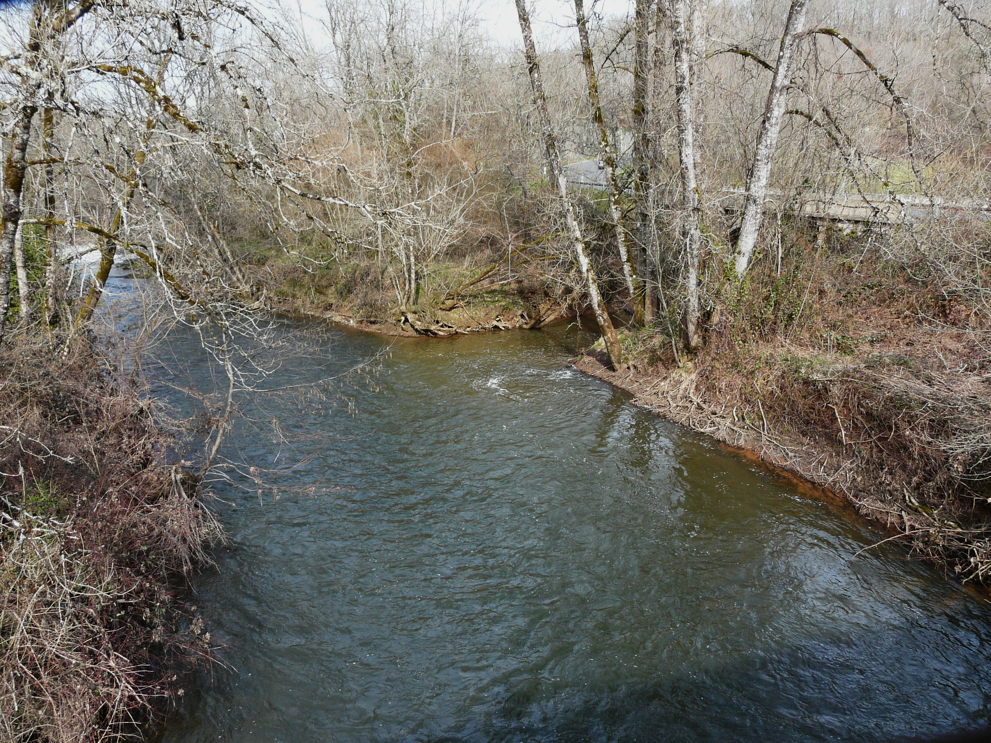 Le confluent du ruisseau le Dalon (qui vient de la droite) avec l'Auvézère, au lieu-dit les Montagnes, à côté du pont de Guimalet, en limite des communes d'Anlhiac (à gauche de la photo) et de Génis (à droite), Dordogne, France